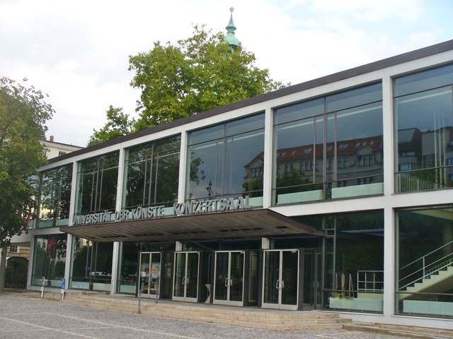 Universitaet der Kuenste Konzertsaal (Art University Concert Hall)